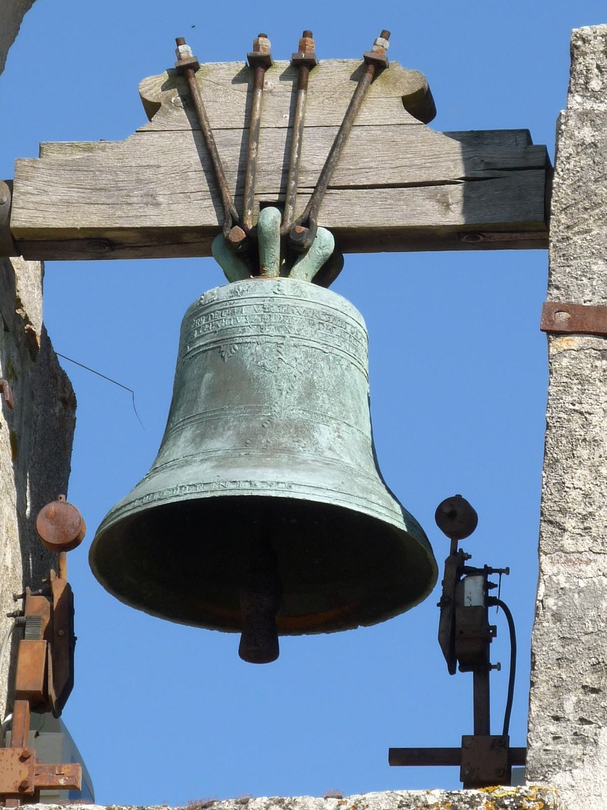 Cloche de l'église de Chartuzac, Charente-Maritime, France